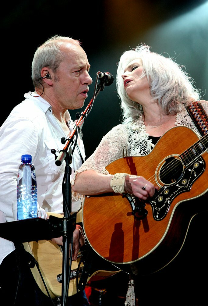 Mark Knopfler en Emmylou Harris, Ahoy 2006, foto: C. Kuhl /